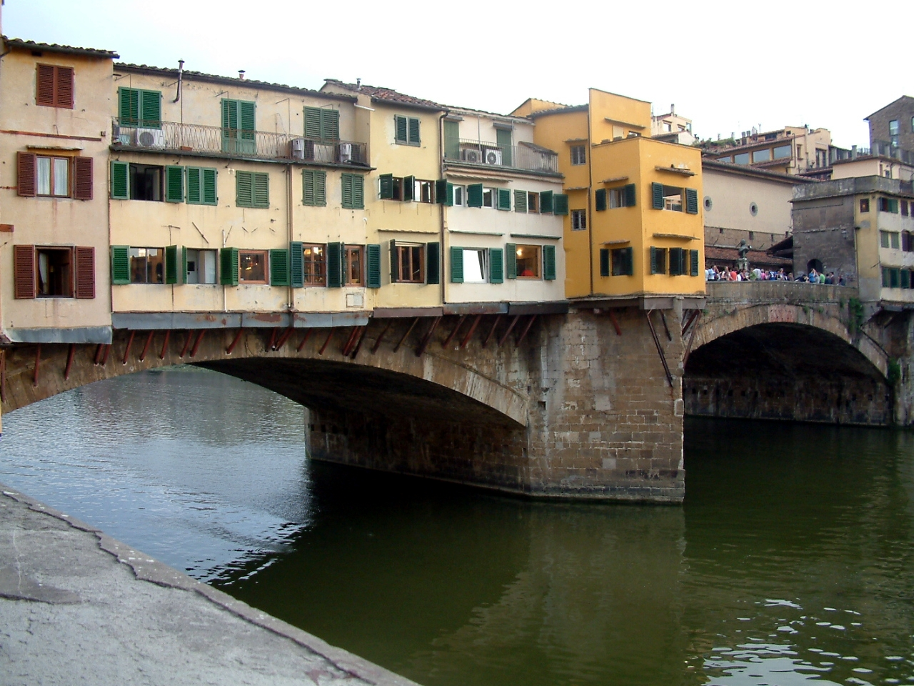 Kulturstätte: Ponte Vecchio Einer der kultigsten Orte der Stadt ist der mittelalterlich anmutende Ponte Vecchio, die Brücke über den Arno, an deren Flanken sich kleine aber sehr feine Geschäfte befinden und zu jeder Tageszeit ein reges Treiben herrscht. Der Corridoio Vasariano, der sich an der Ostseite der Brücke entlangschlängelt, verbindet die Uffizien mit dem Palazzo Pitti. Ist man mit seiner/m Liebsten da, sollte man ein Schloss mitbringen, das man an ein Denkmal auf der Brücke kettet, um seine Liebe zu besiegeln